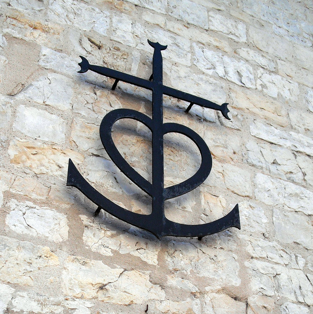 Símbolo característico del pueblo.